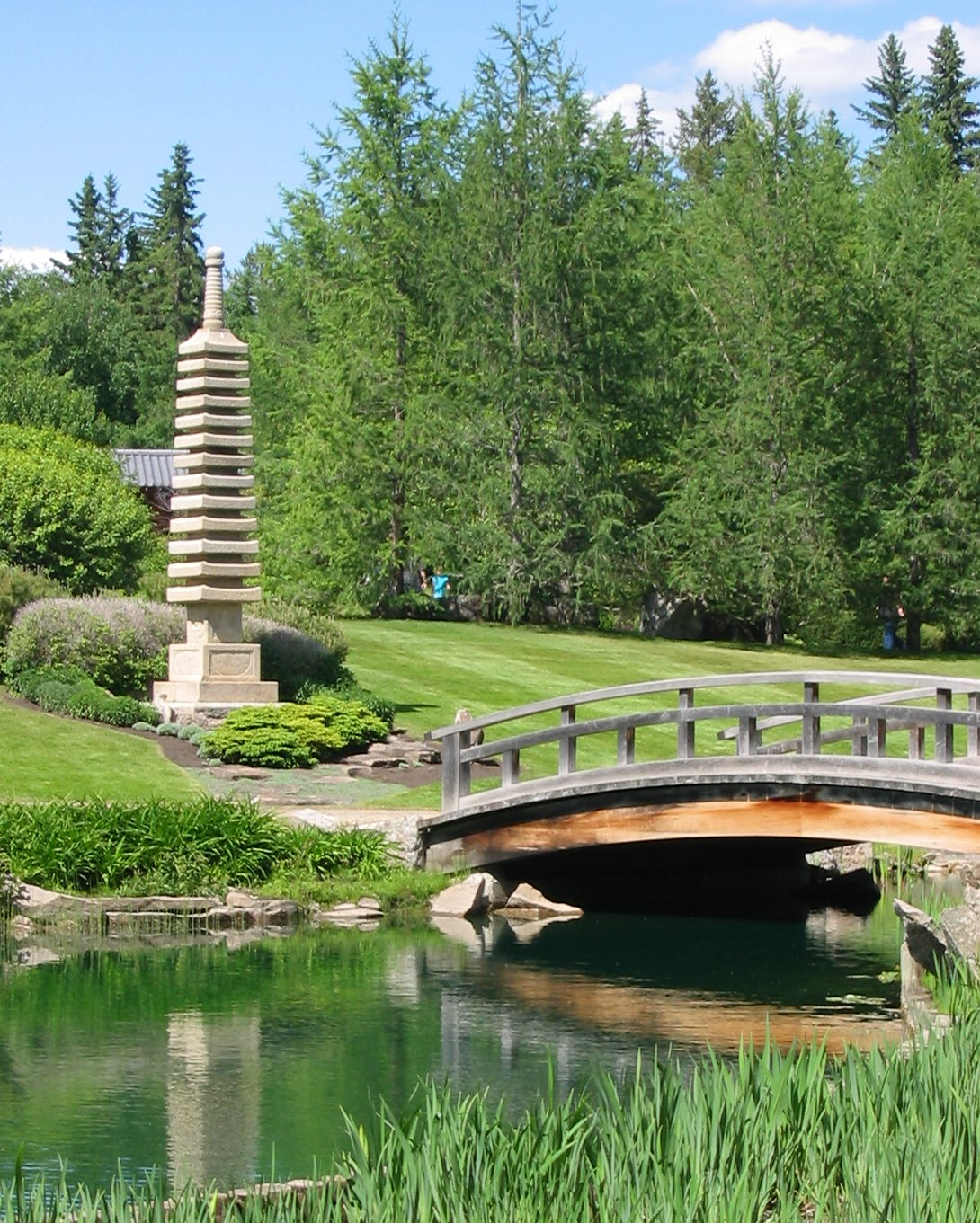 Japanese Garden of Devonian Botanical Garden.